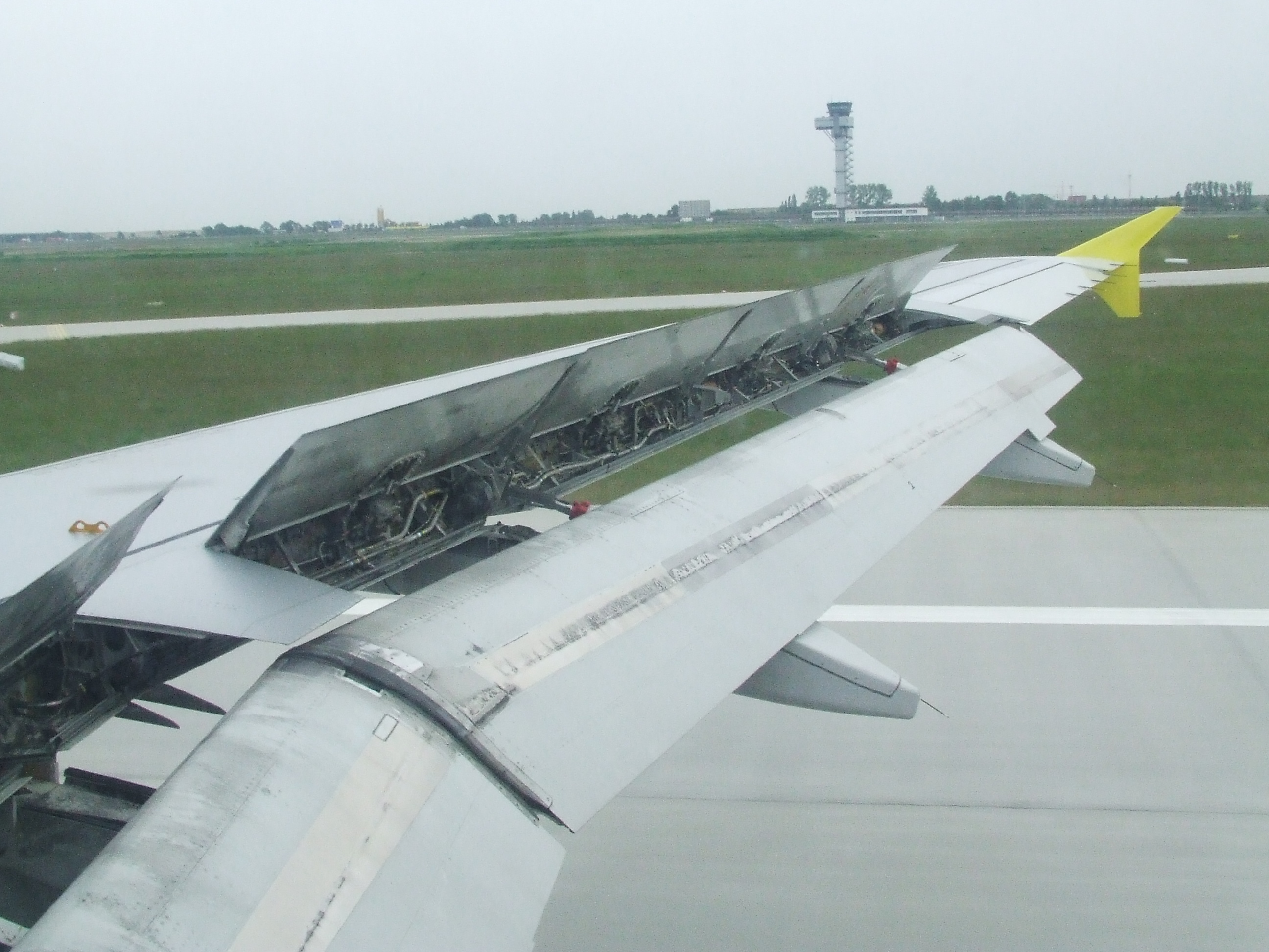 Ausgefahrene Landeklappen des Airbus A-320 D-AKNY bei der Landung auf RWY 08 in Halle/Leipzig. Germanwings Flug Köln-Halle.